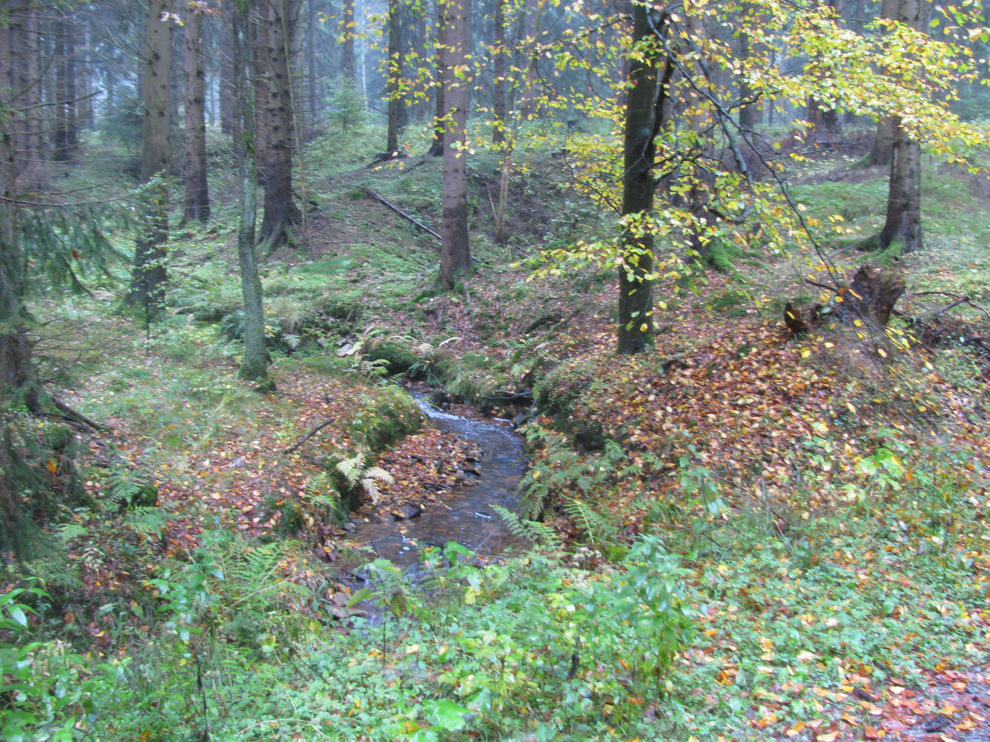 ein Bach im Kaufunger Wald, unterhalb vom Hochmoor Hühnerfeld, hier als Teil des FFH-Gebiets 4623-331 Bachtäler im Kaufunger Wald